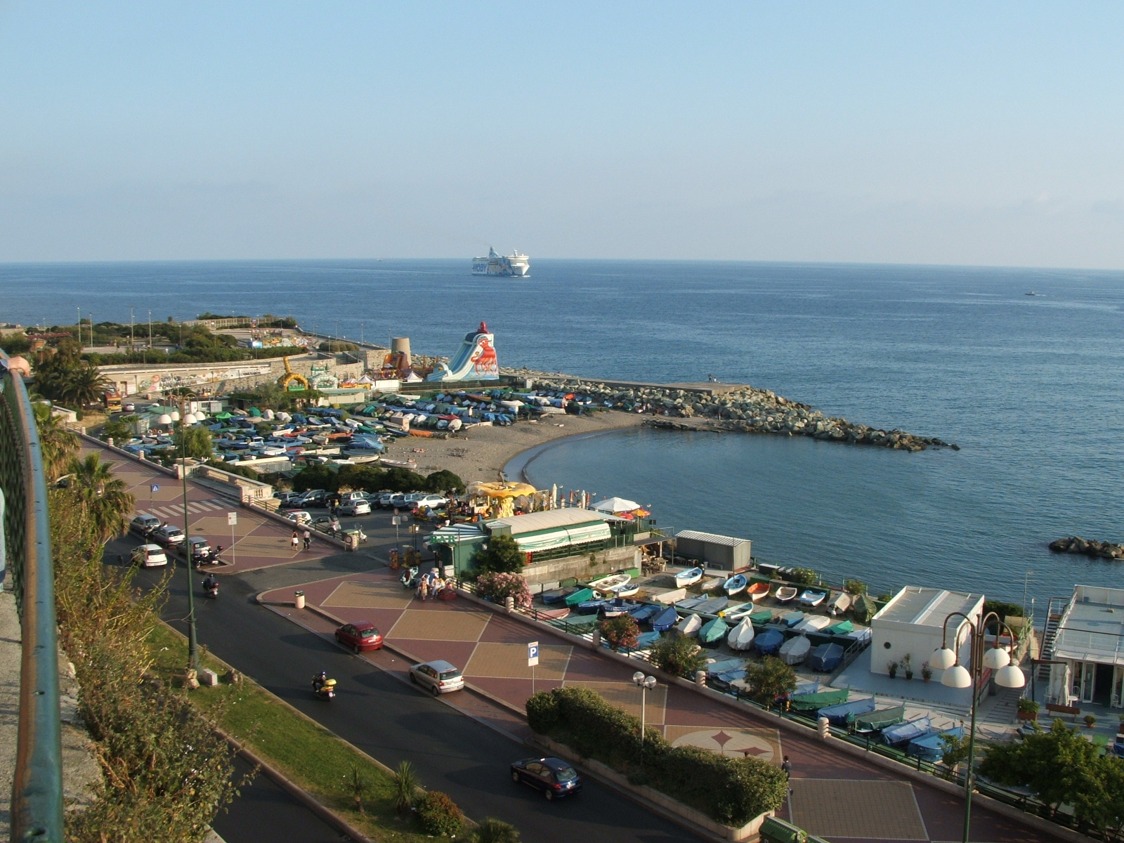 Immagine dal quartiere della Foce, Genova Corso Italia alla Foce - giardini Gilberto Govi